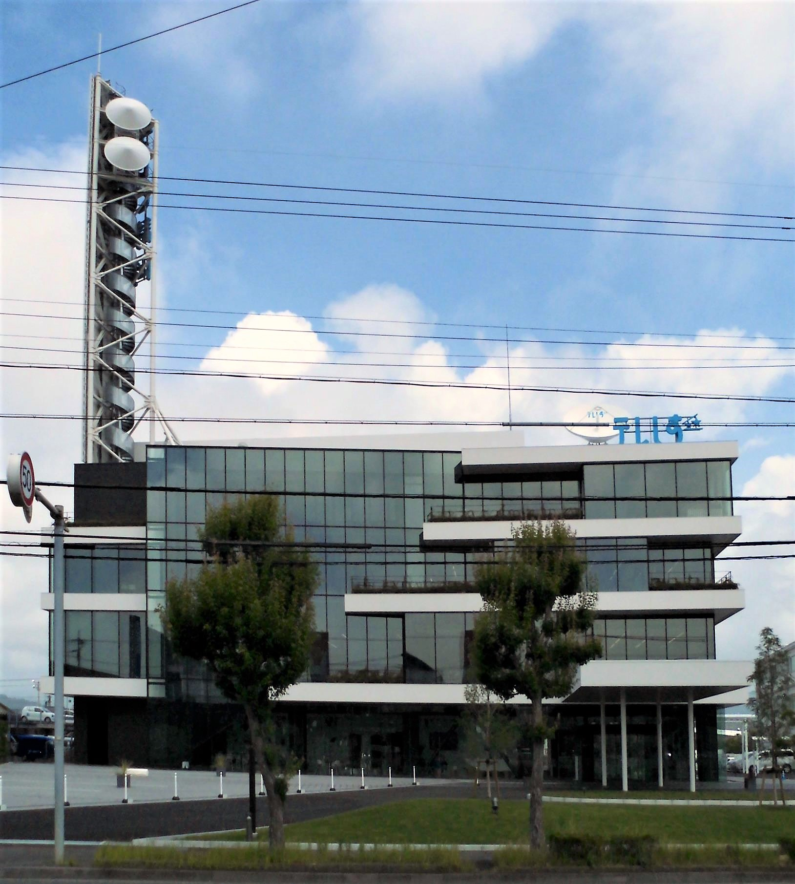 テレビ静岡 本社社屋（静岡市駿河区栗原）。本人が撮影、一部補正 2017年10月2日に使用開始